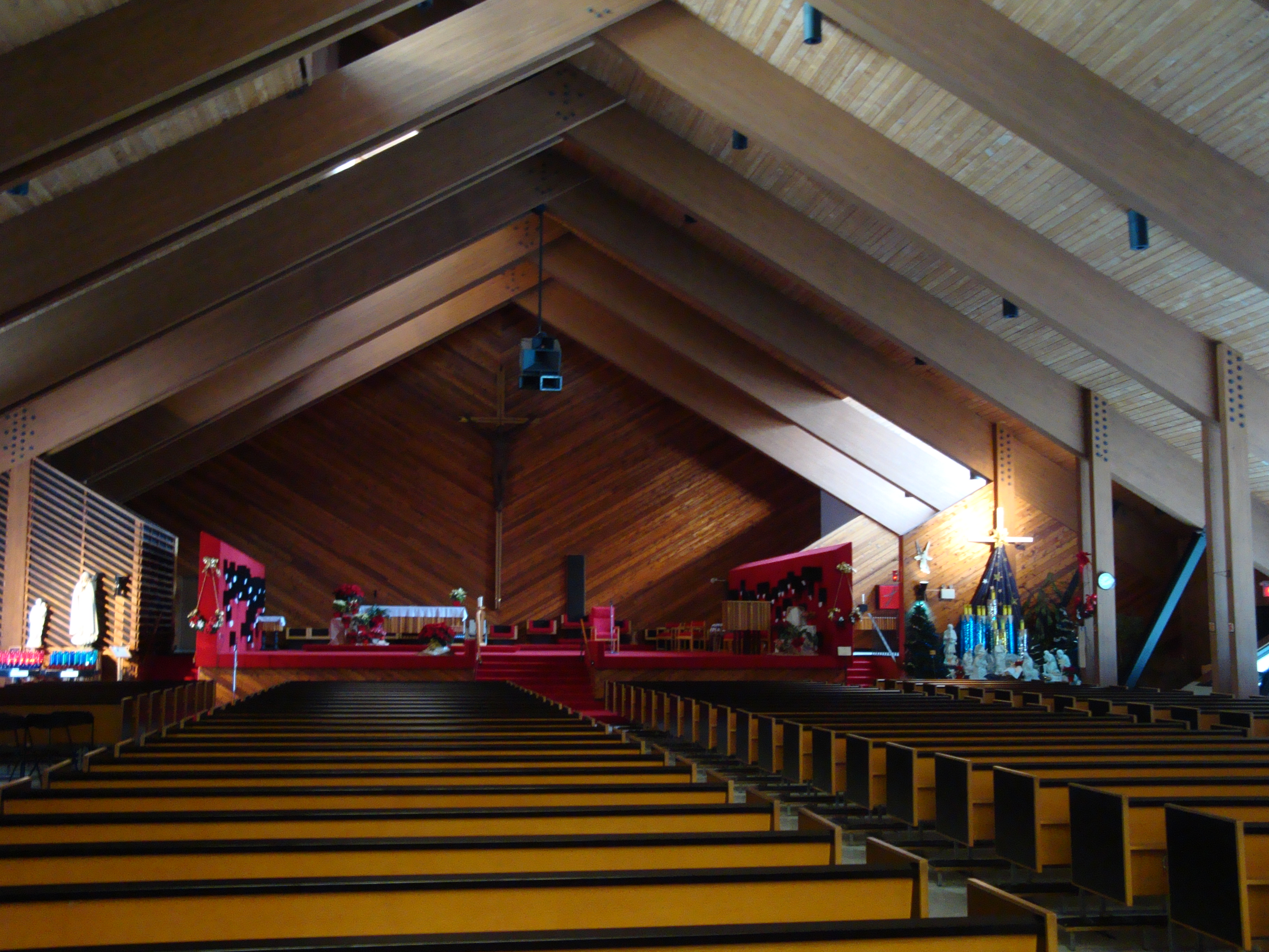 Intérieur de la cathédrale de Gaspé